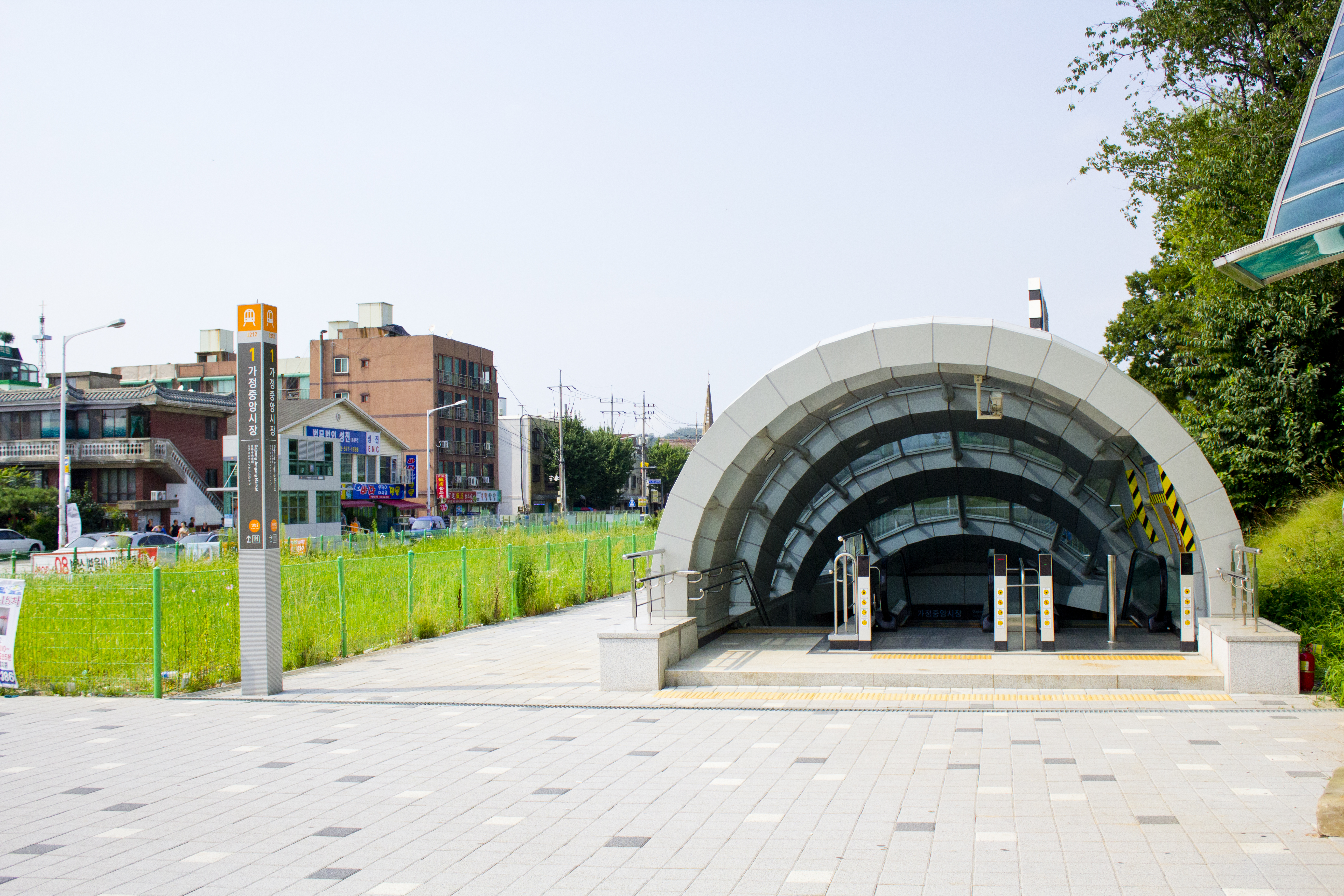 인천2호선 가정중앙시장역 1번출구